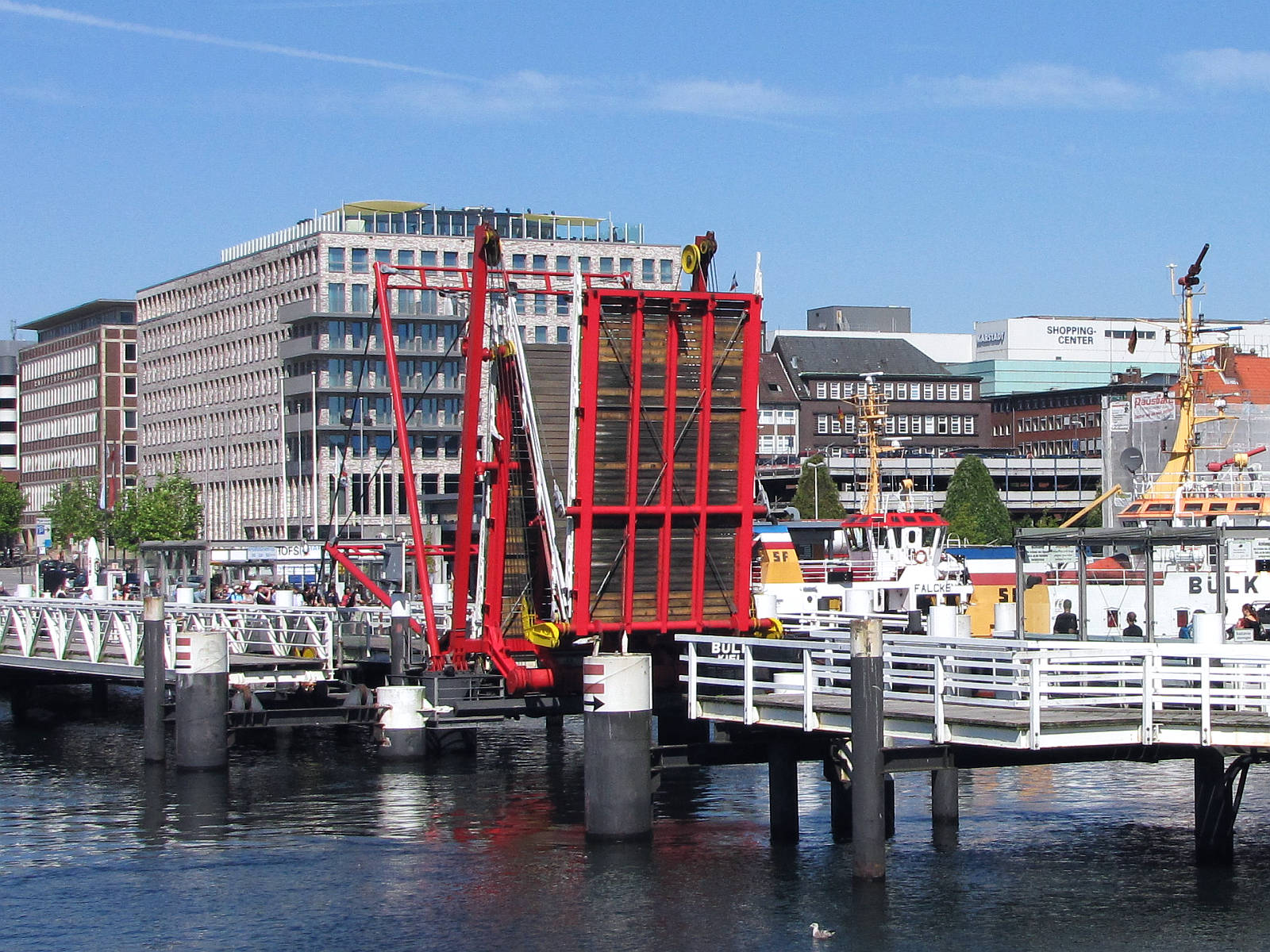 Hörnbrücke 1997 Dreifeldlappbrücke in Kiel über die Hafenspitze Hörn - Schleswig-Holstein - Fofo Wolfgang Pehlemann IMG_5099